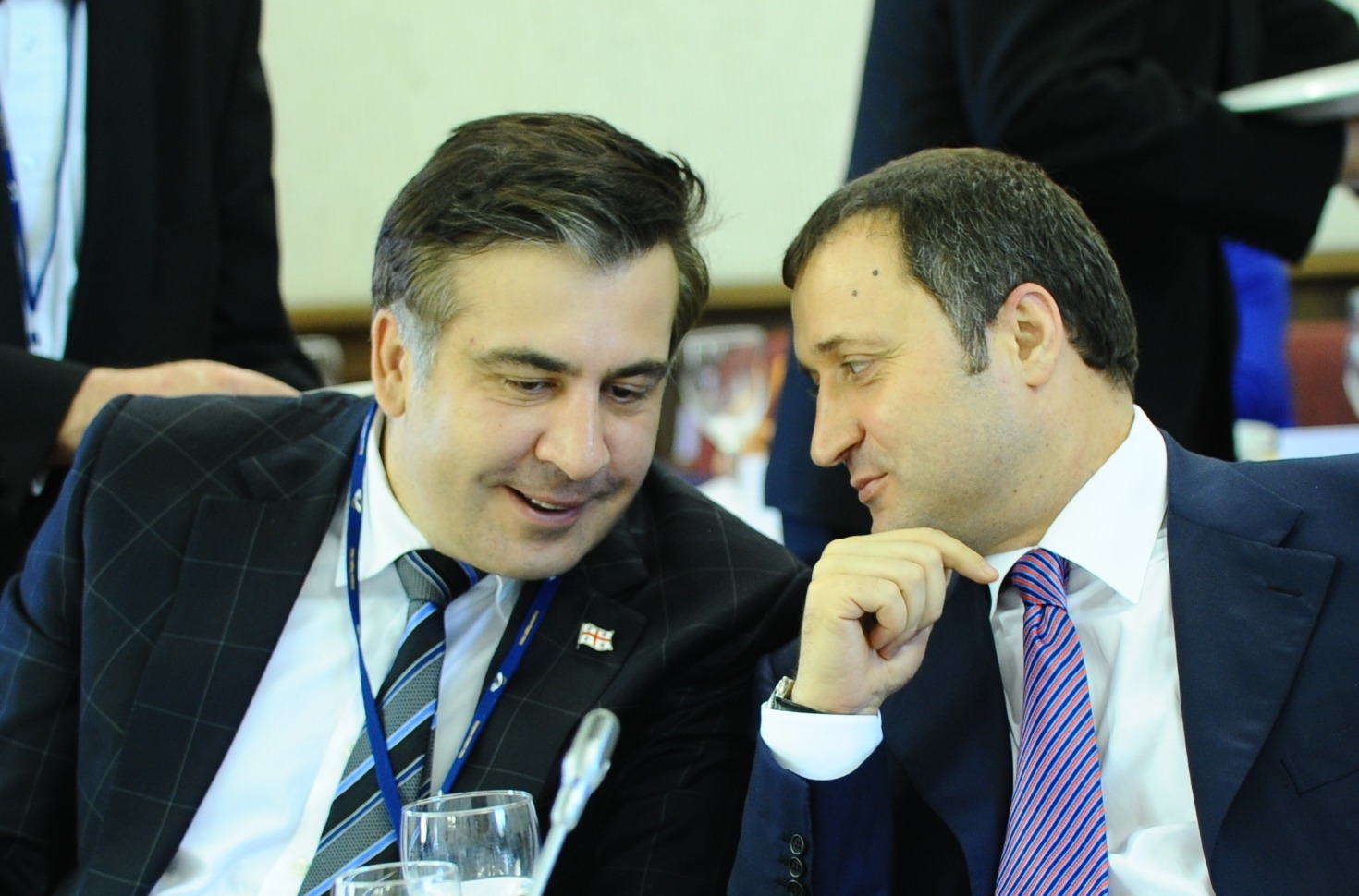 Mikheil Saakashvili, Vlad Filat